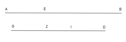 Il·lustració d'una de les proposiciones de les Data d'Euclides